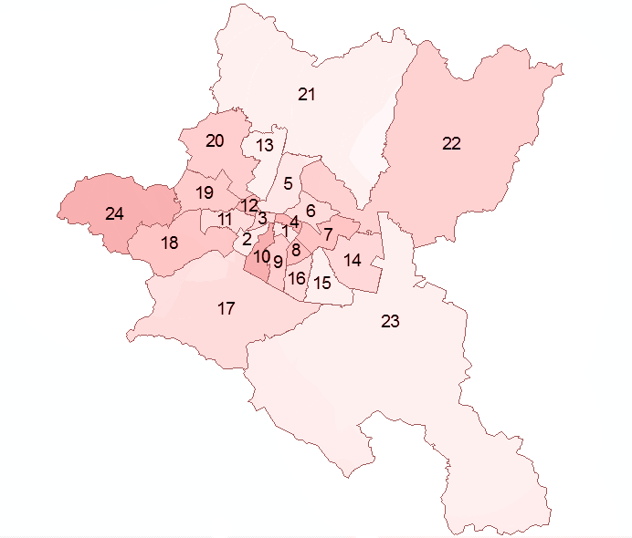 Карта на съдебния район на Софийския районен съд